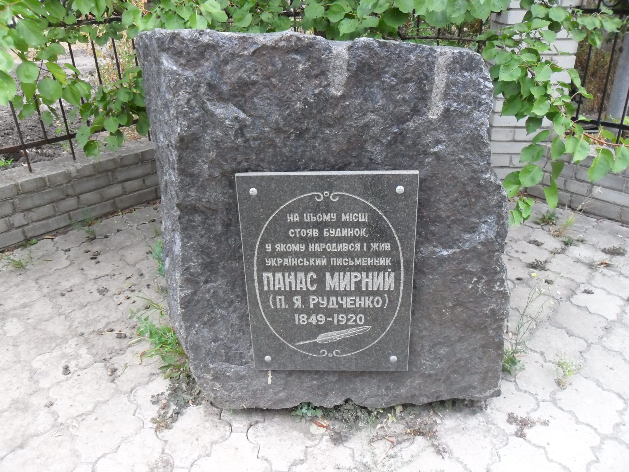 Місце, де народився Панас Мирний.